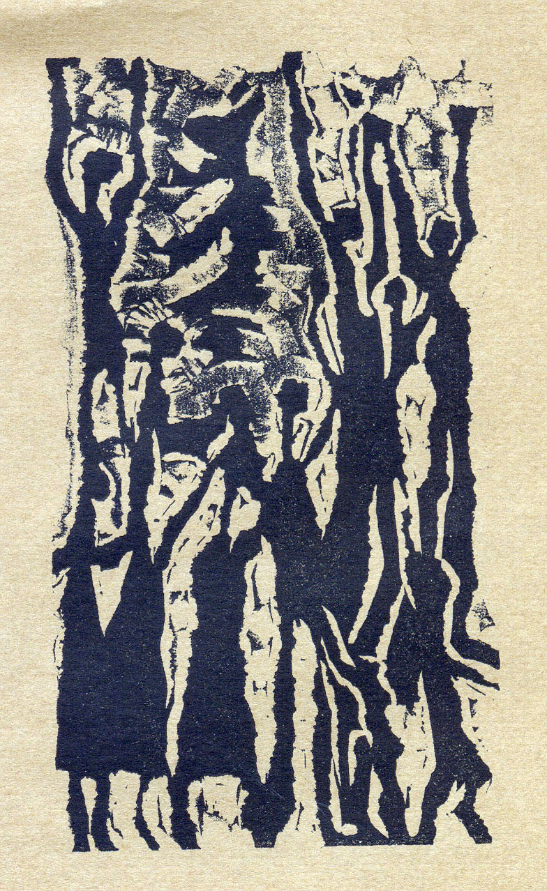 Grabado del taller Ilari bautizado Aimsa. Fotografía del álbum personal de la artista digitalizada por mí.